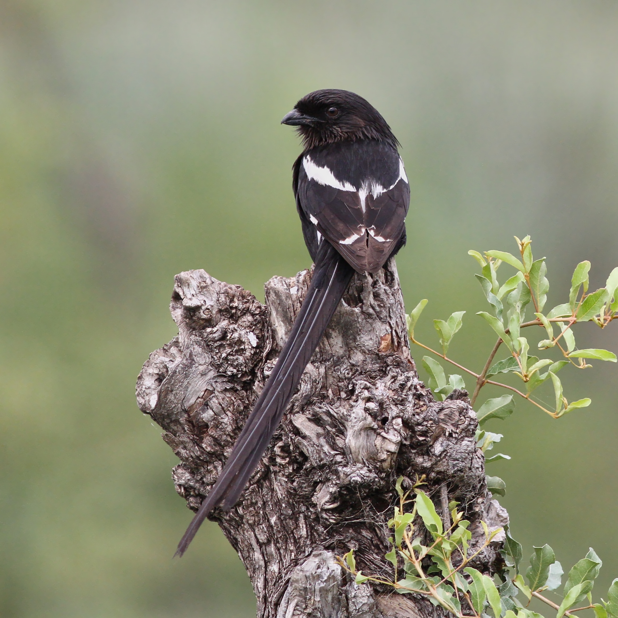 Magpie shrike, Urolestes melanoleucus, at Kruger National Park